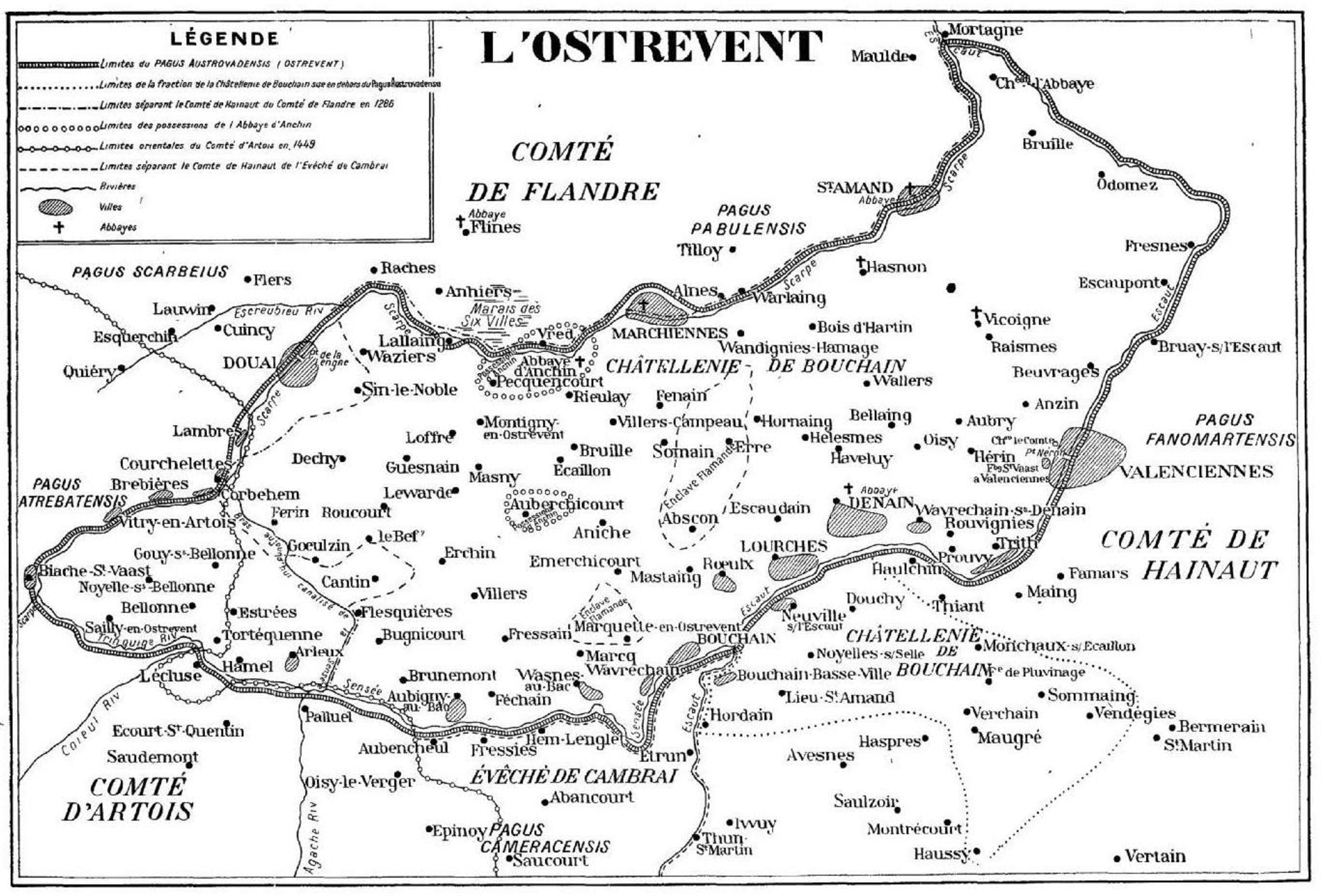 Carte de l'Ostrevent source : Le Moyen âge : bulletin mensuel d'histoire et de philologie / direction MM. A. Marignan, G. Platon, M. Wilmotte